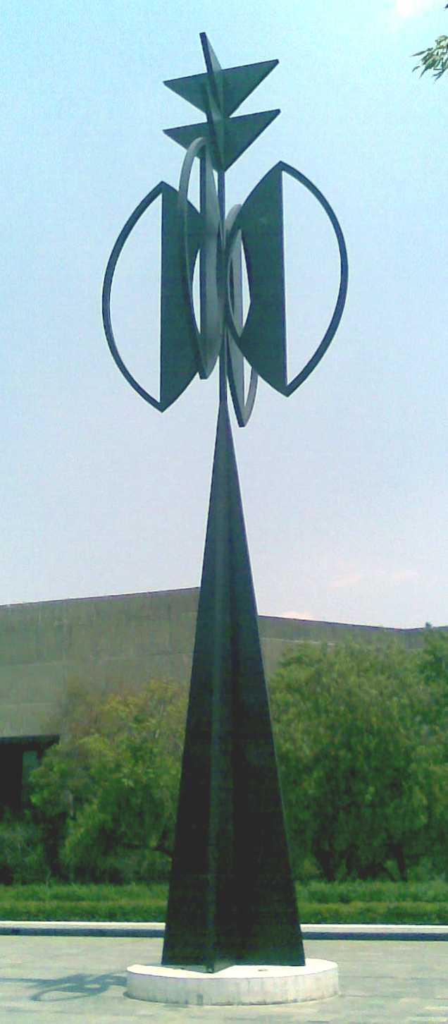 La Espiga, obra de Rufino Tamayo, frente a las instalaciones del MUAC en Ciudad Universitaria, México.